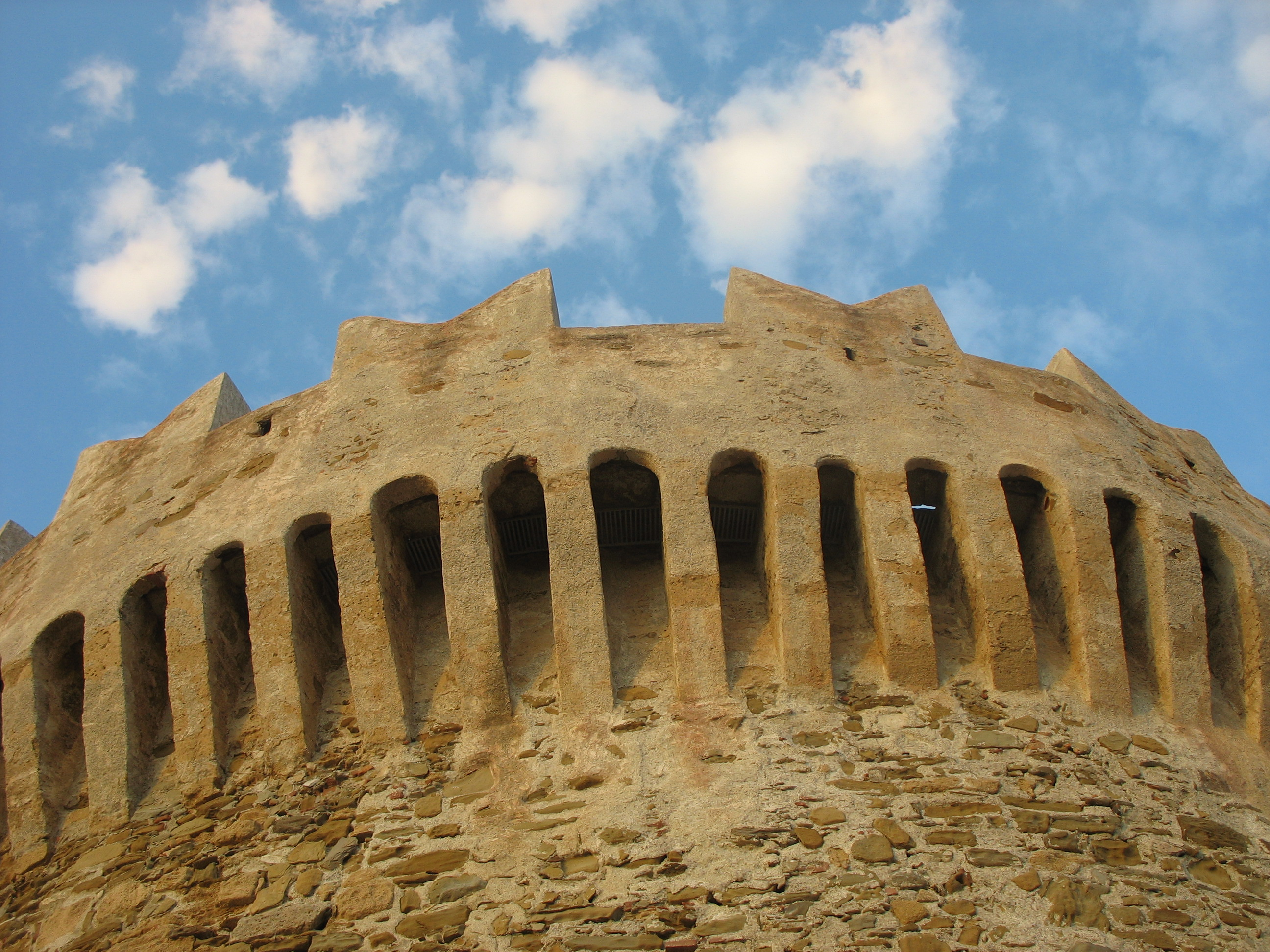 Fortezza di Populonia (particolare)